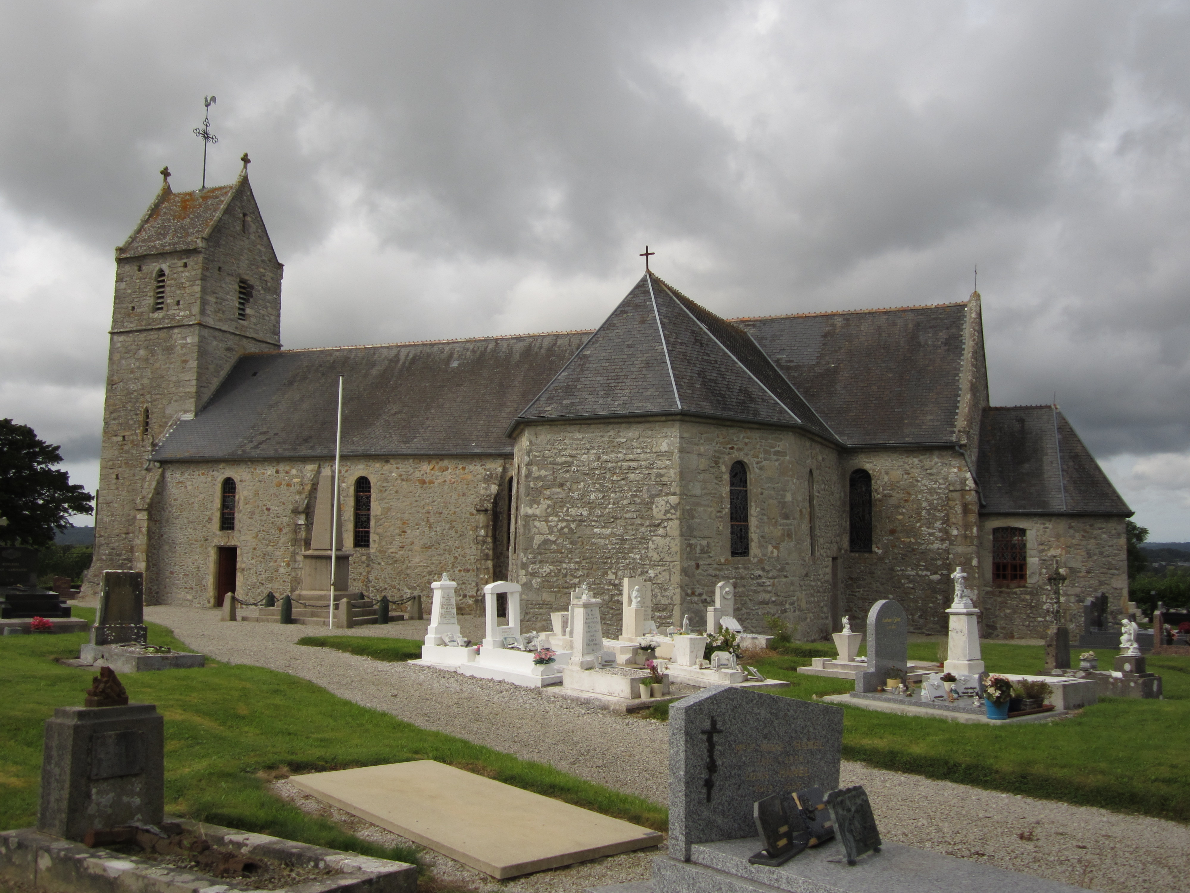 Église Saint-Michel de Bricquebosq